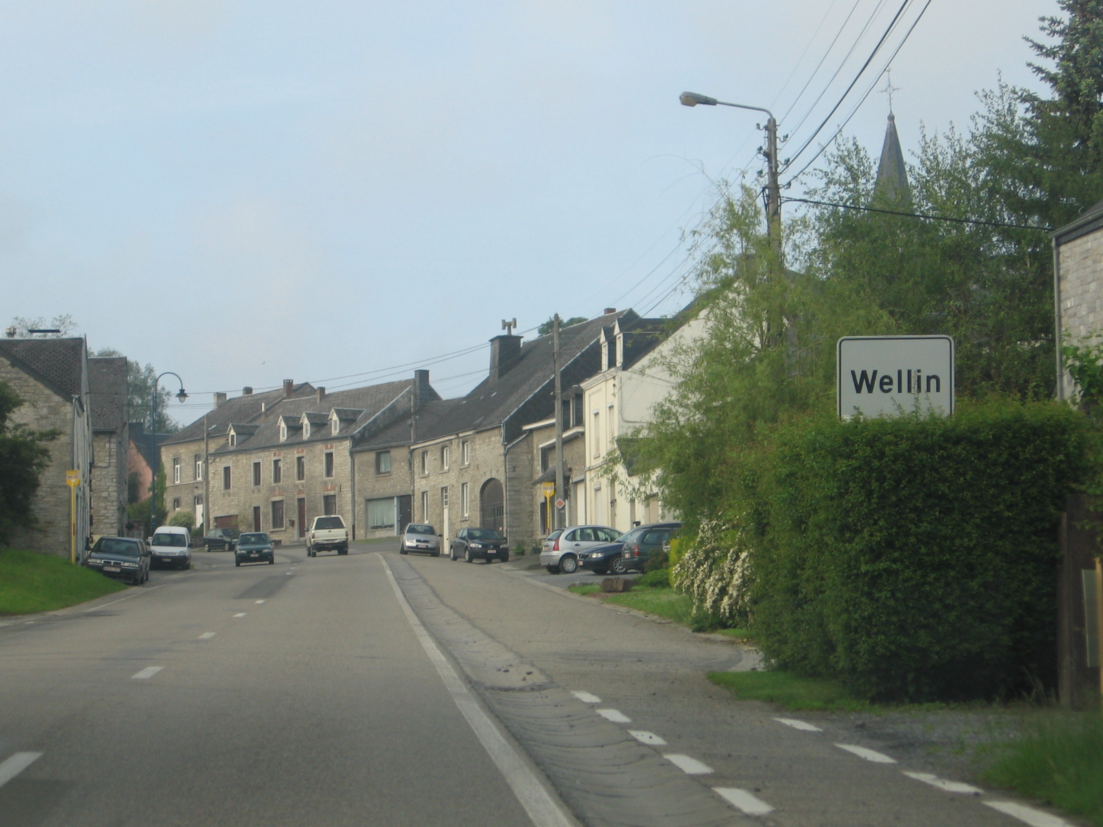 Wellin